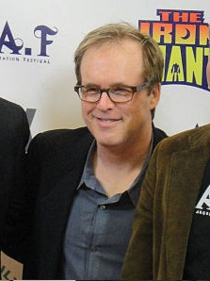 Brad bird en la proyección del gigante de hierro con John Andrews y Miles Flanagan